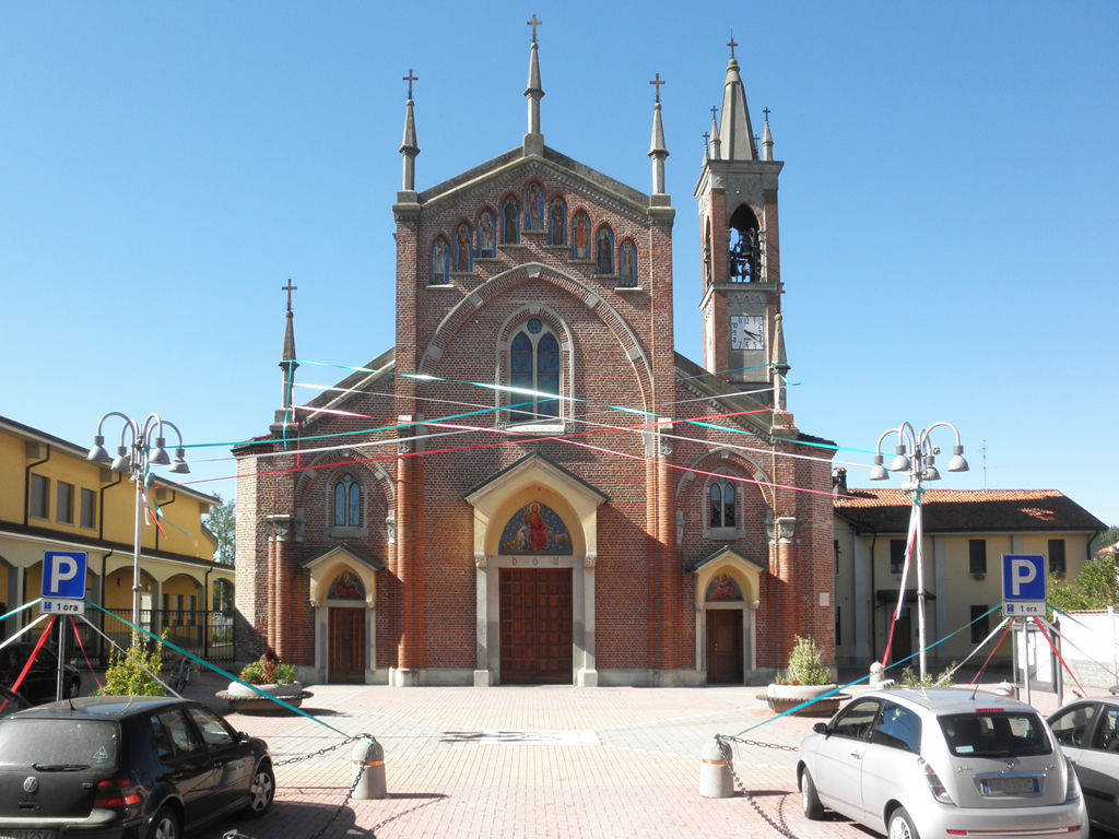 Chiesa parrocchiale di Borgo San Giovanni